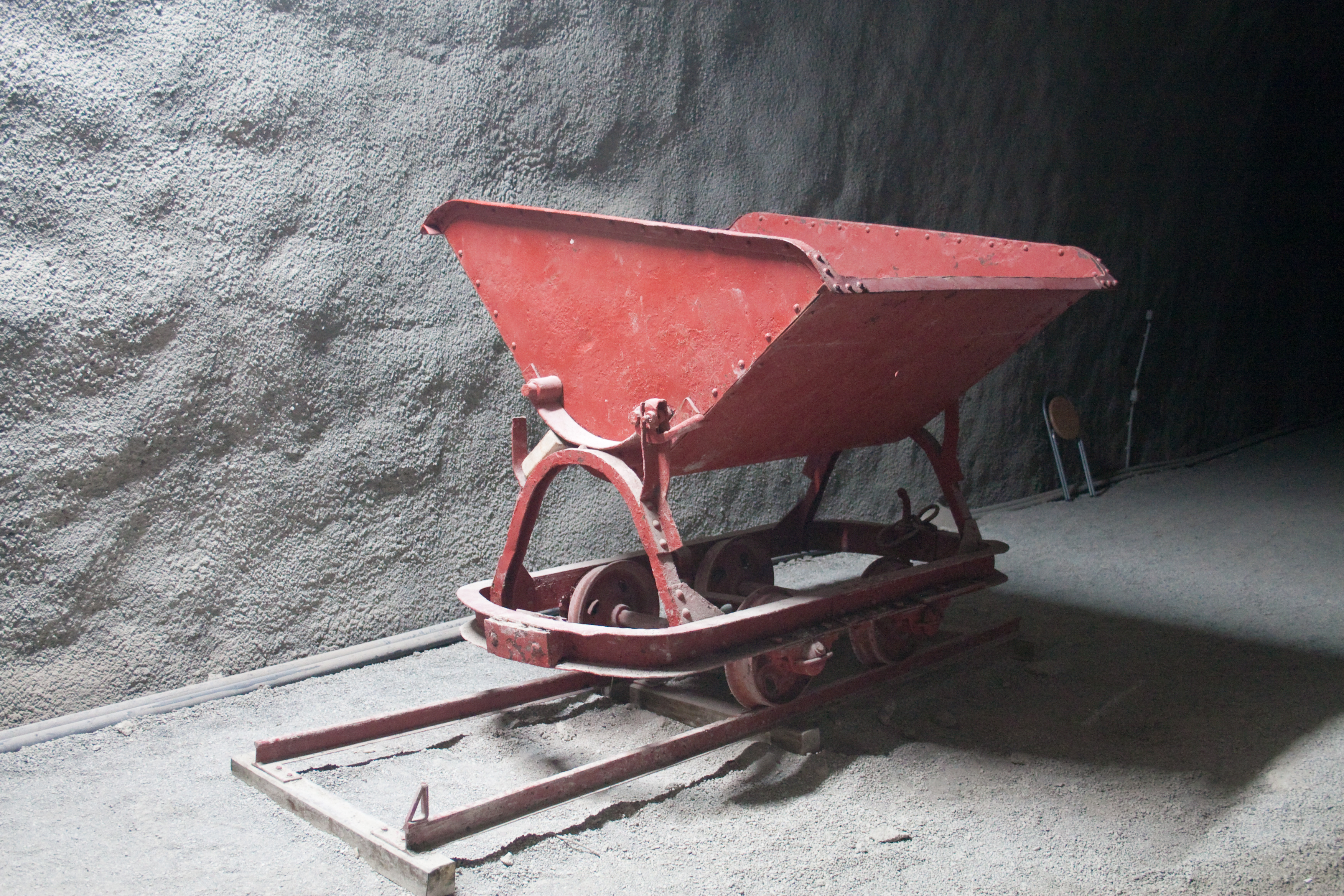 Goldbacher Stollen, Überlingen, Baden-Württemberg, Germany